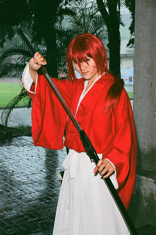 台南一中存在革命同人活動，《神劍闖江湖》緋村劍心cosplayer。